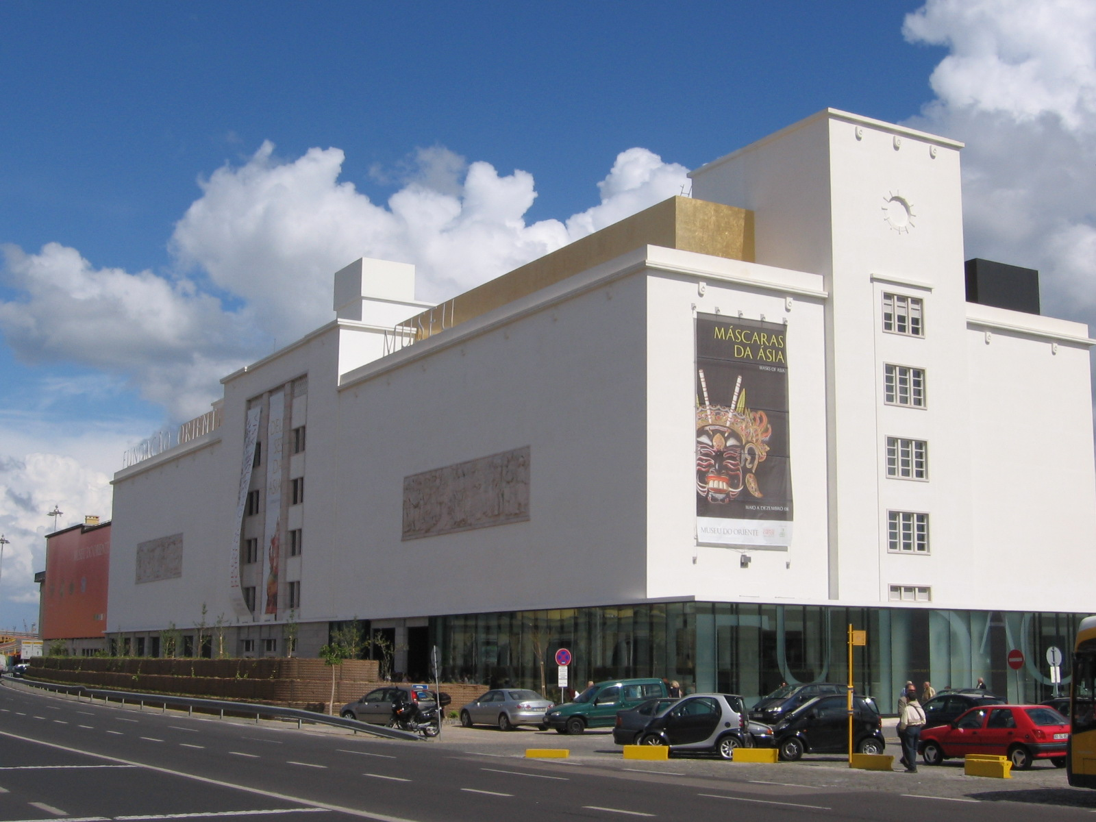 Edifício Pedro Álvares Cabral , antigos Armazéns Frigoríficos do Bacalhau, actual Museu do Oriente, Alcântara, Lisboa